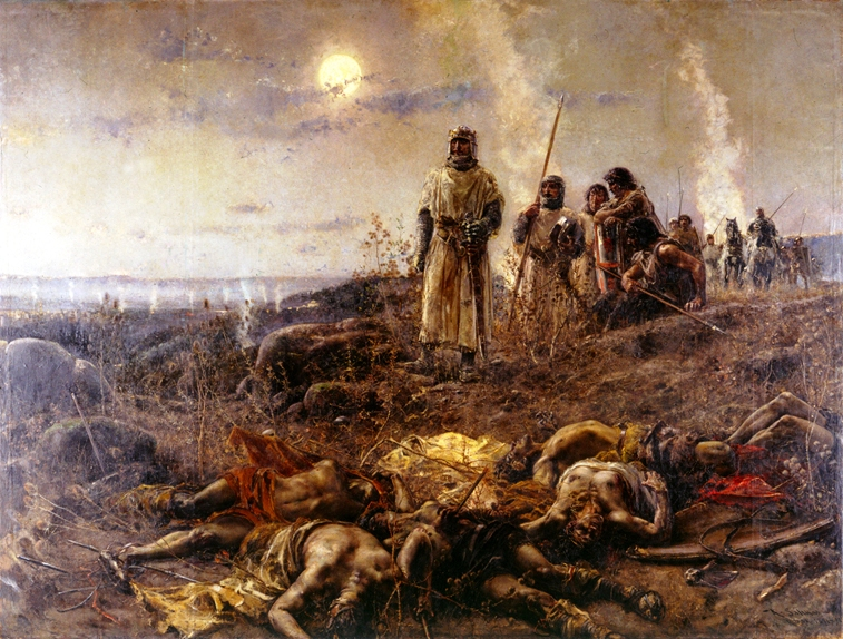 La obra muestra el momento en que el rey Alfonso I de Aragón († 1134), contempló la matanza llevada a cabo por los almogávares contra las tropas musulmanas de Imad al-Dwla, gobernador de Zaragoza, y poco antes de que la ciudad de Zaragoza cayera en manos de los cristianos, lo que ocurrió en el año 1118. Esta matanza tuvo lugar en un barranco de los montes de Torrero y cerca de la ciudad de Zaragoza.